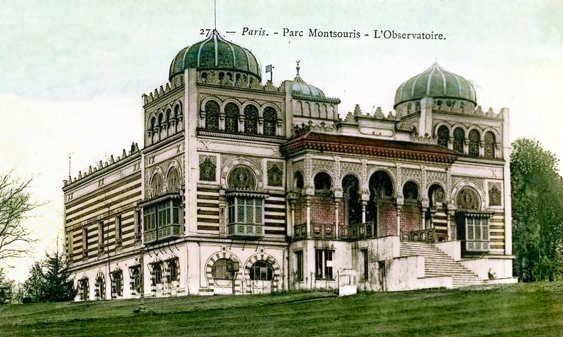 Palais du Bardo - Paris, Parc Montsouris (France) ; carte postale